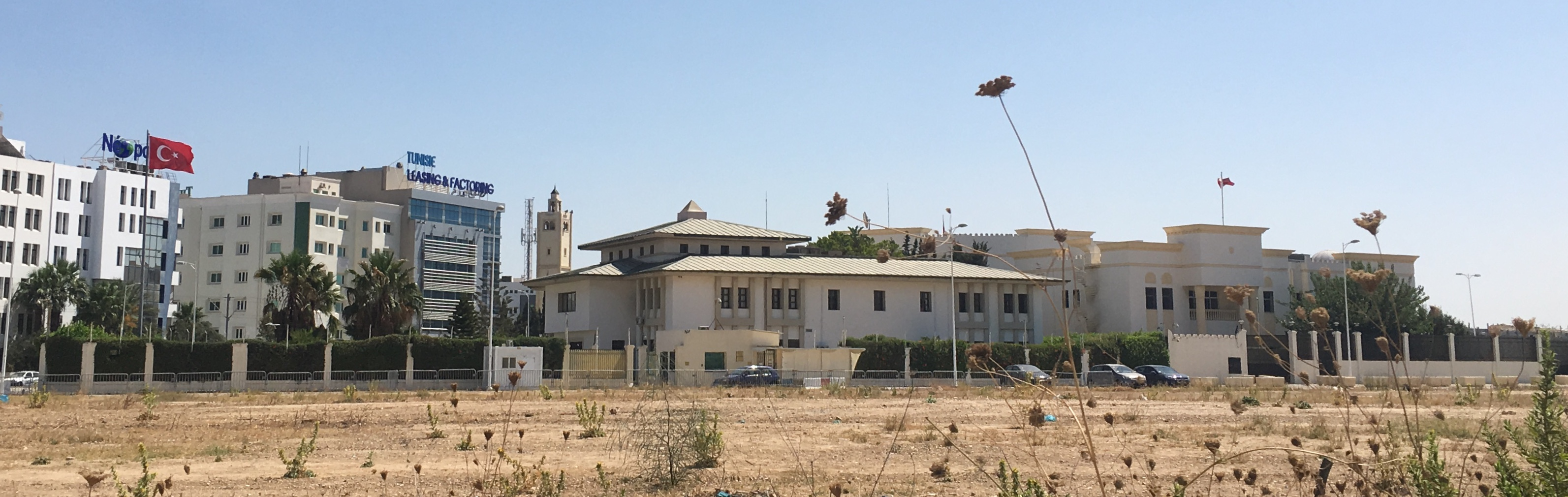 Ambassades de Turquie et du Qatar en Tunisie, 2019.